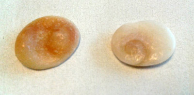 Fòssil nummulit